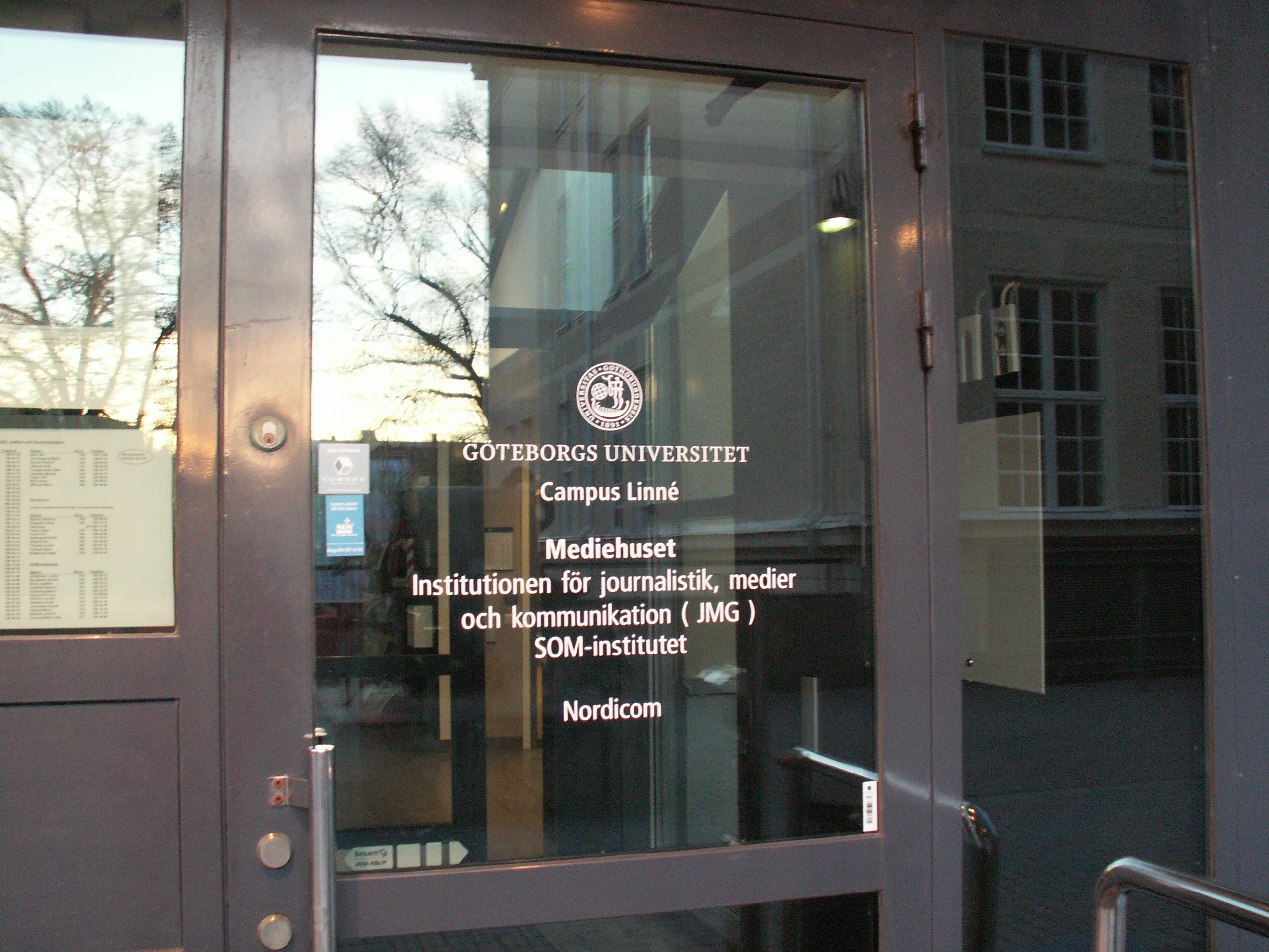 Entrén till Institutionen för journalistik, medier och kommunikation (Campus Linné på Göteborgs universitet).